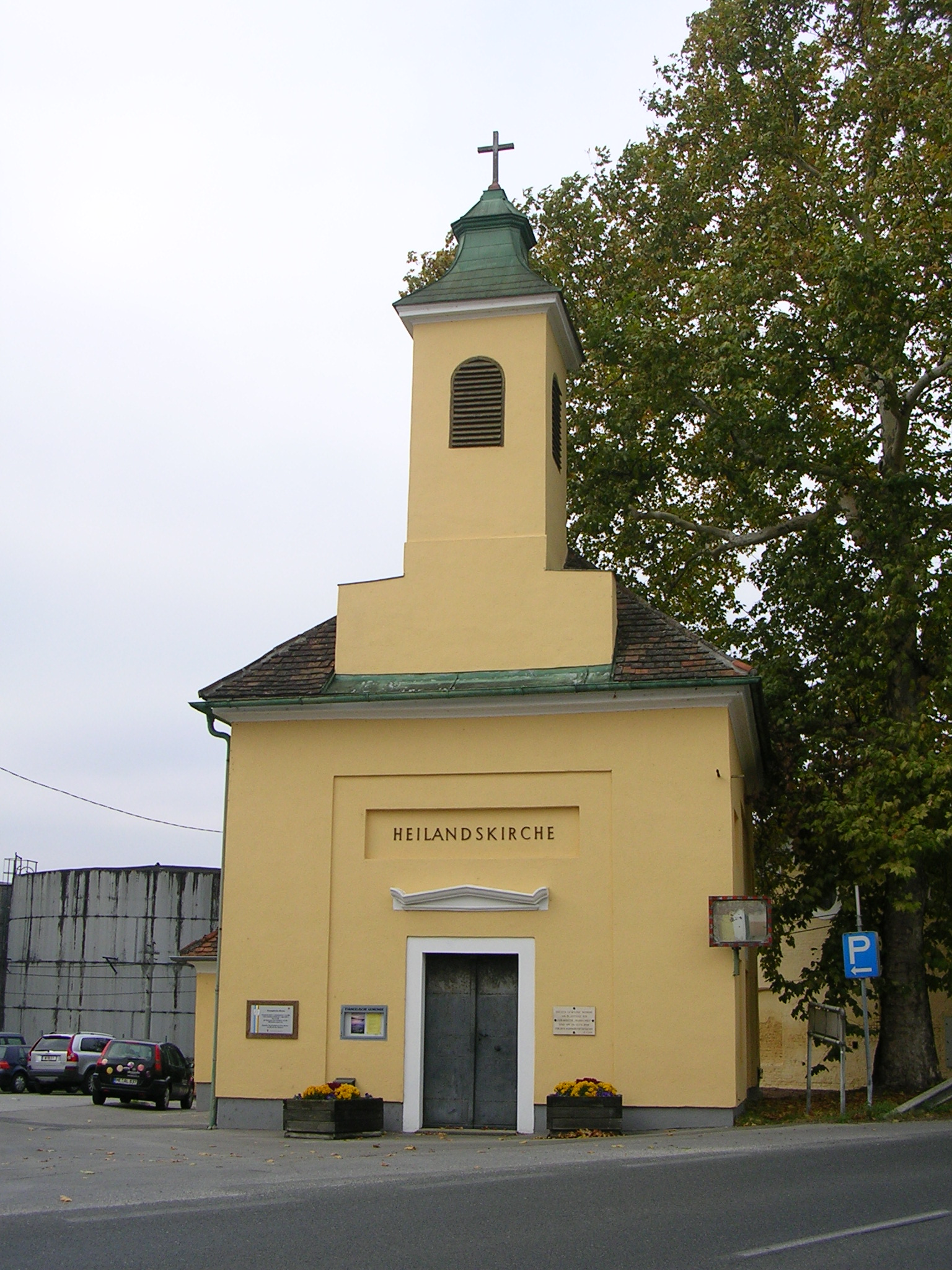 Evangelische Heilandskirche in Spillern, Bezirk Korneuburg